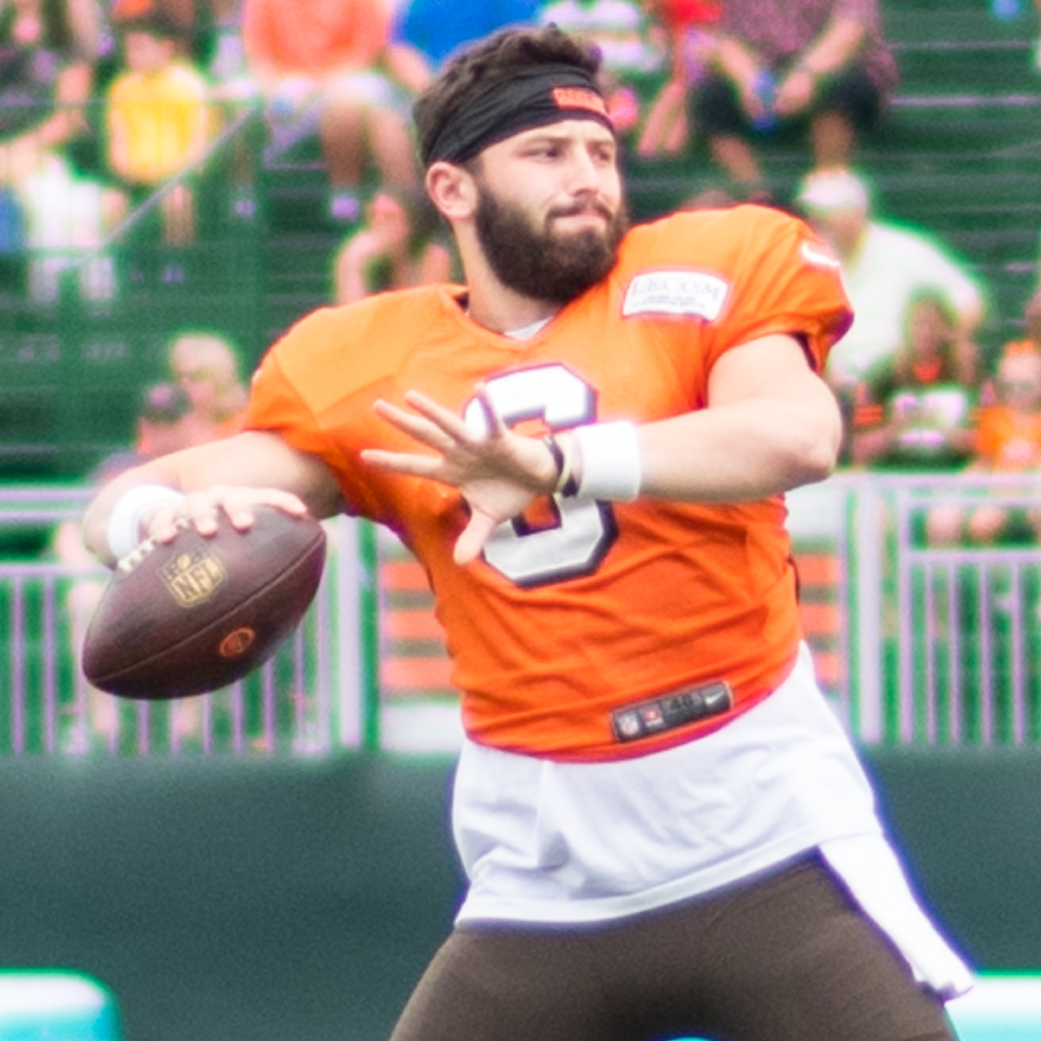 Baker Mayfield